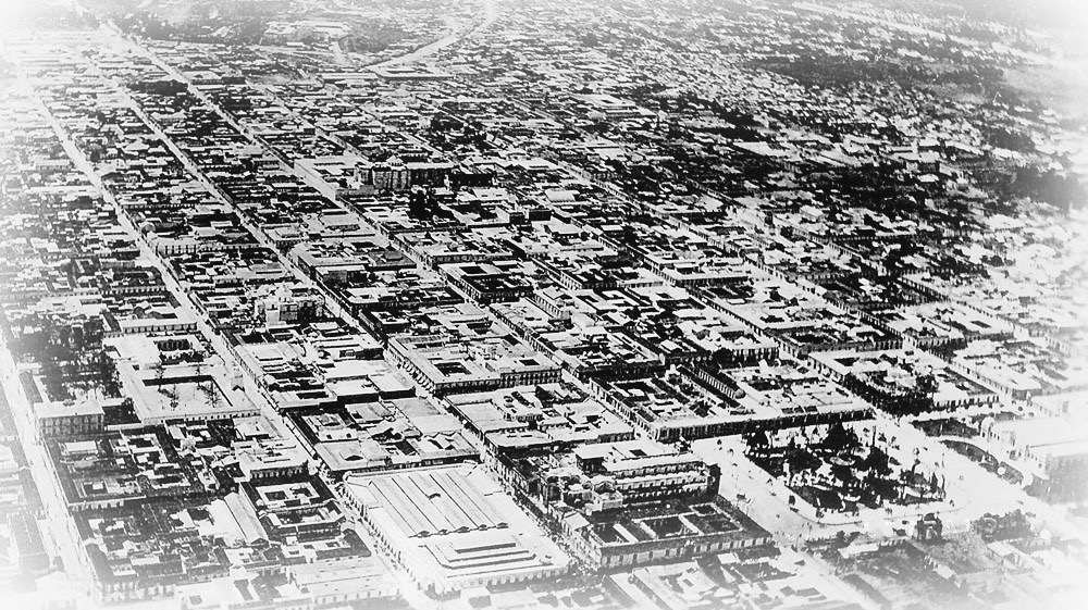 Ciudad de Guatemala en 1921. Ya se había recuperado un poco de los terremotos de 1917-18,.